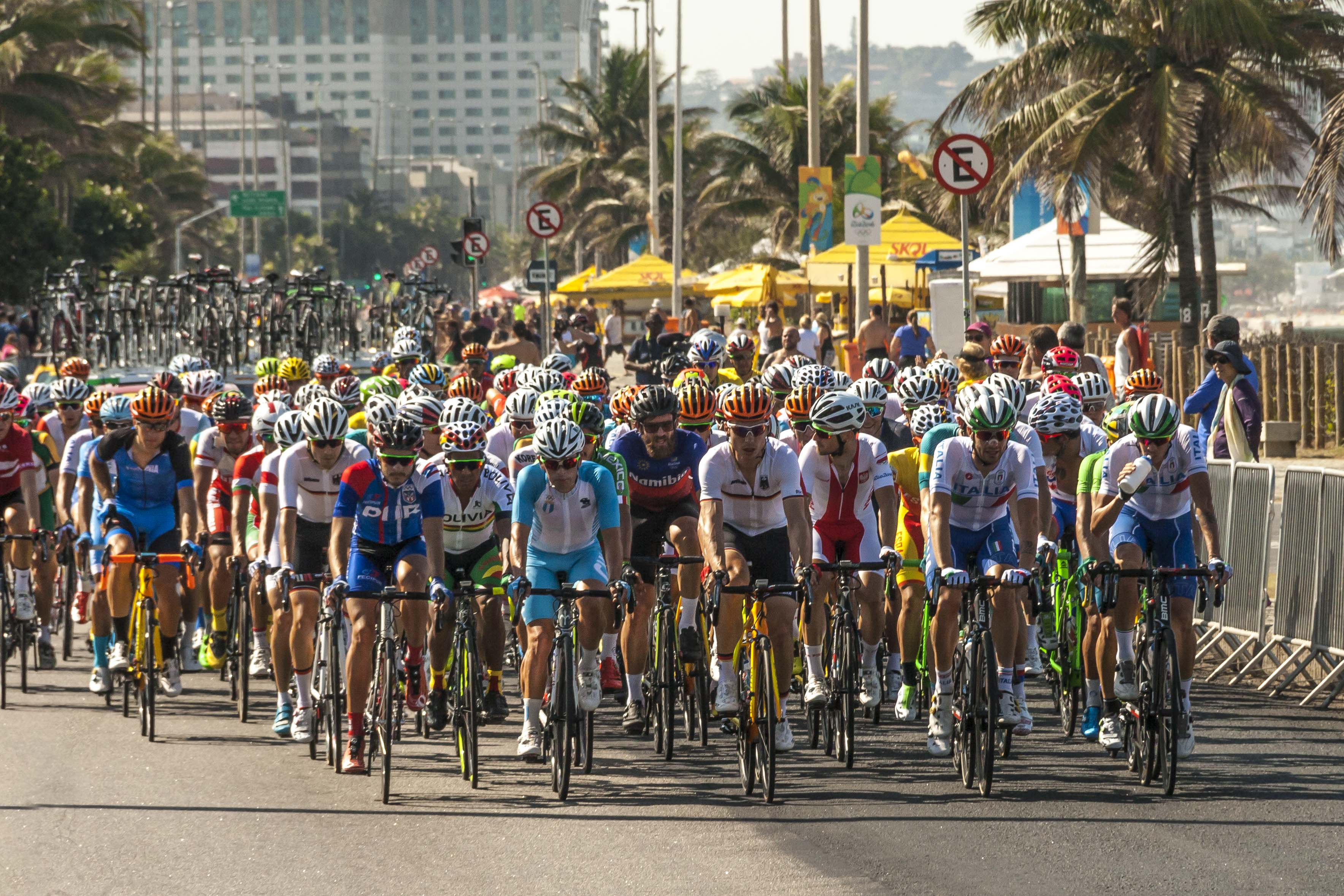 O grupo compacto chega a gran velocidade pelas ruas de Barra da Tijuca